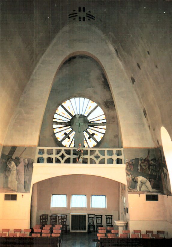 Eglise de Roupy (02) - La tribune vue du choeur - Photo par moi-même